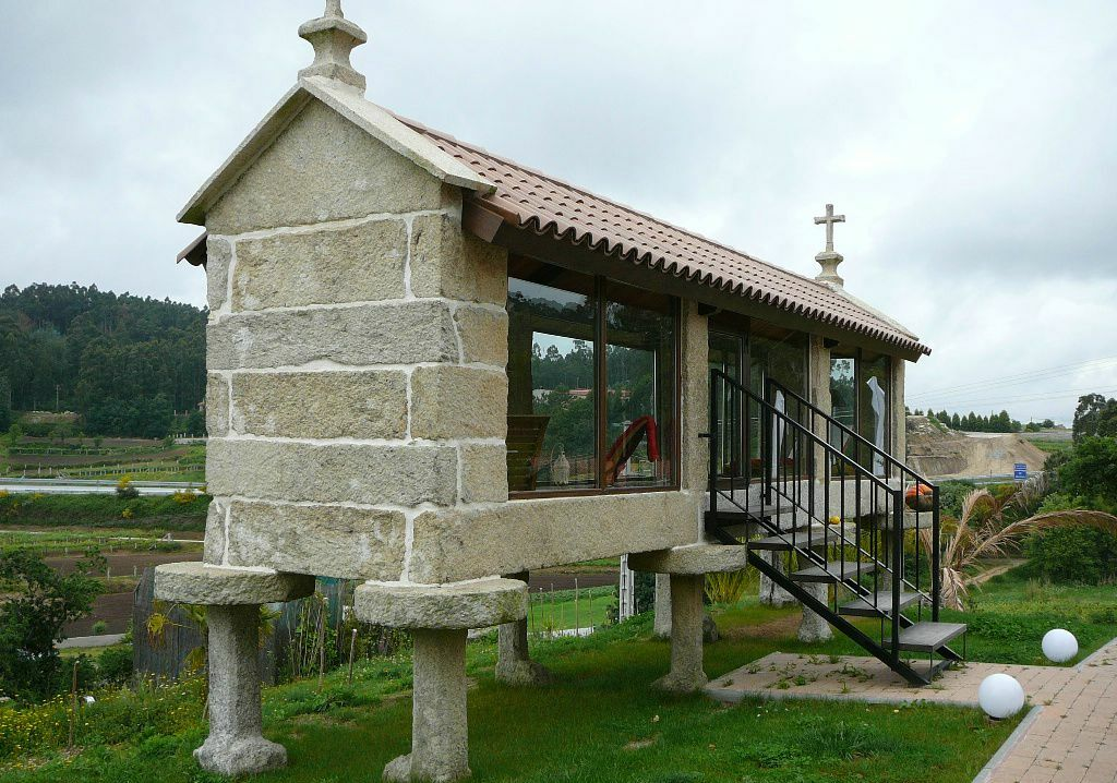 Meaño-Cabazo